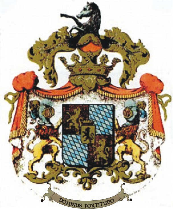 Escudo Nobiliario de la Familia Lanza Branciforte, Rama de Italia y Argentina